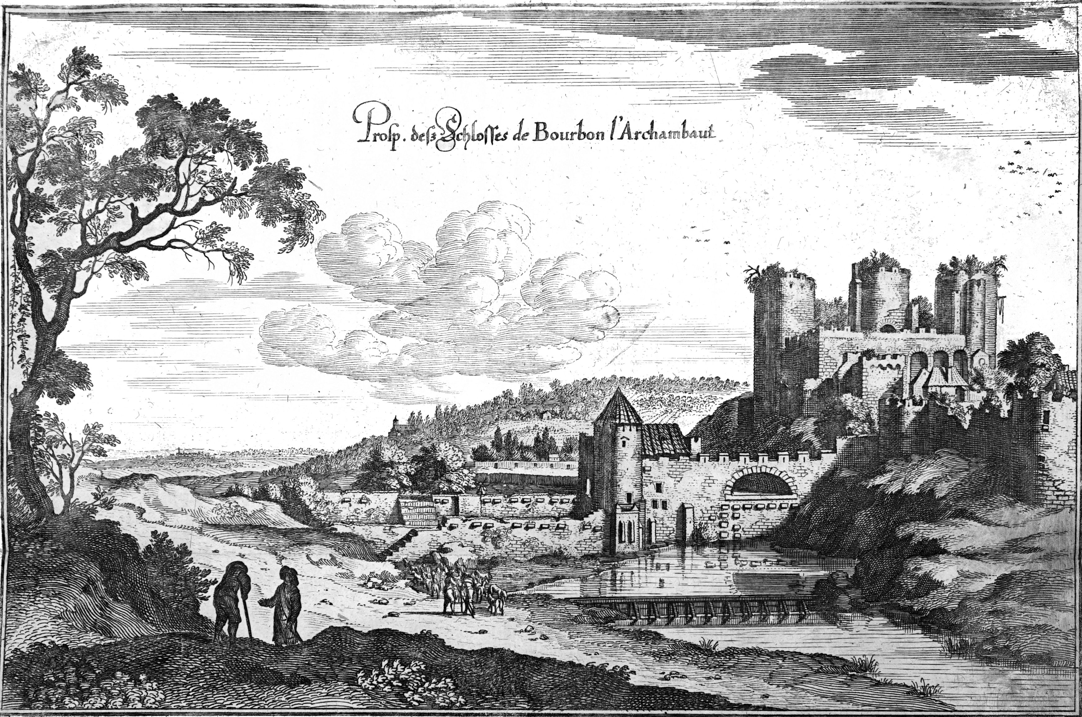 provenant de "Topographiae Galliae".